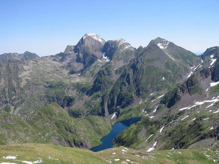 Mont Valier, refuge des Estagnous et étang long (vu du port de BarlonguÃ¨re), Couserans, Ariège, Pyrénées, France, photo personnelle, Valier, prise en septembre 2001, 657 Ko Valier